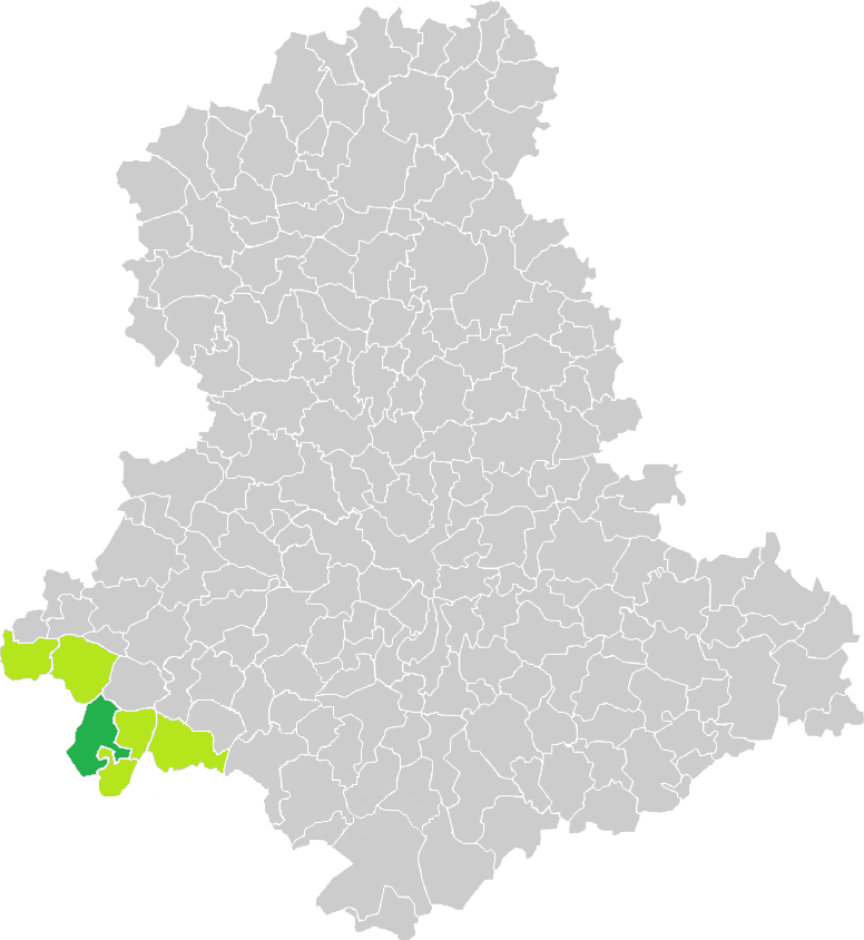 Carte de situation de la commune de Marval (en vert foncé) dans le votre Canton (en vert clair) sur une carte des communes de la Haute-Vienne